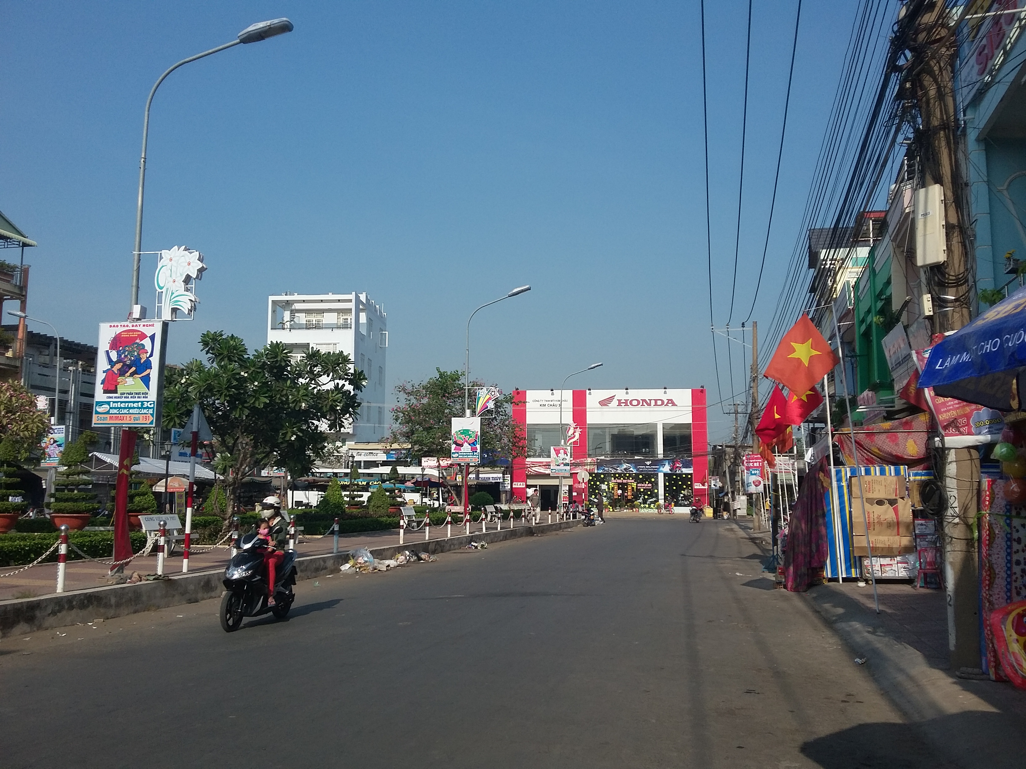 Con đường ở thị trấn An Phú - An Phu town 2016